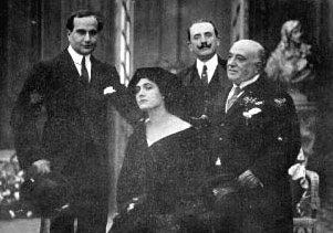 Gustavo Serena, Francesca Bertini, Giuseppe De Liguoro, Camillo De Riso alla "Caesar Film", Roma, gennaio 1916